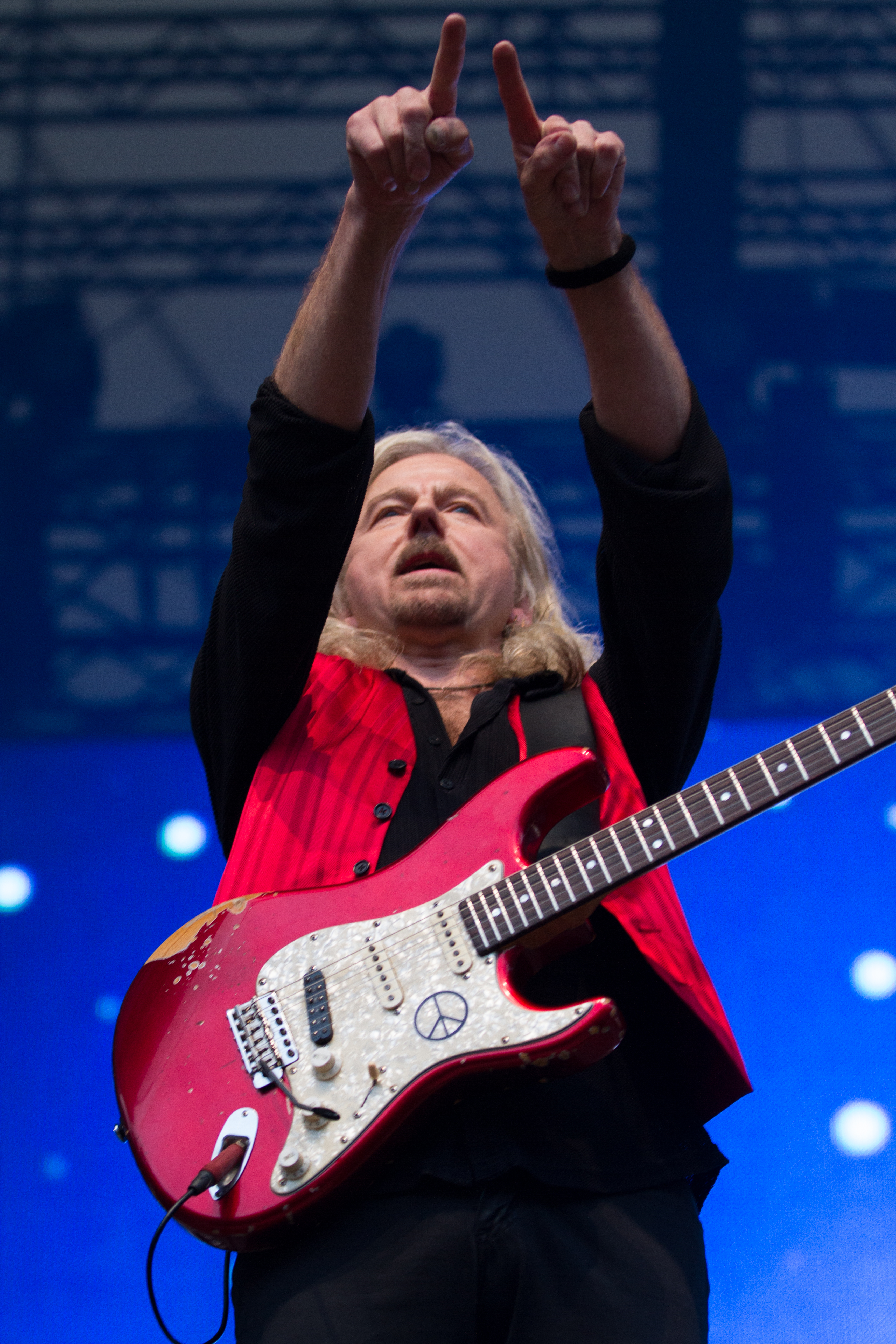 Bernd Römer der Band Karat beim "Karat 40 Jahre KARAT - Das EINZIGE Jubiläumskonzert" in der Berliner Waldbühne am 20.06.2015